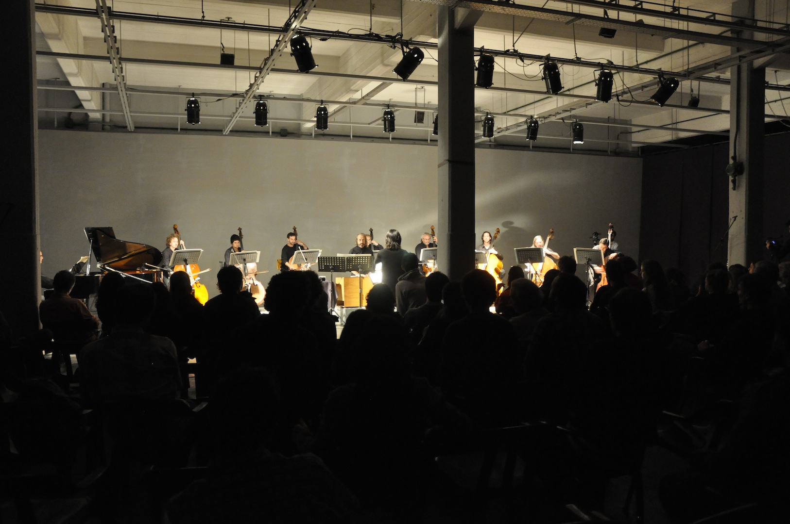 Registro del concierto inaugural de conDiT dedicado a la música rusa y argentina [ cheLA. Buenos Aires]